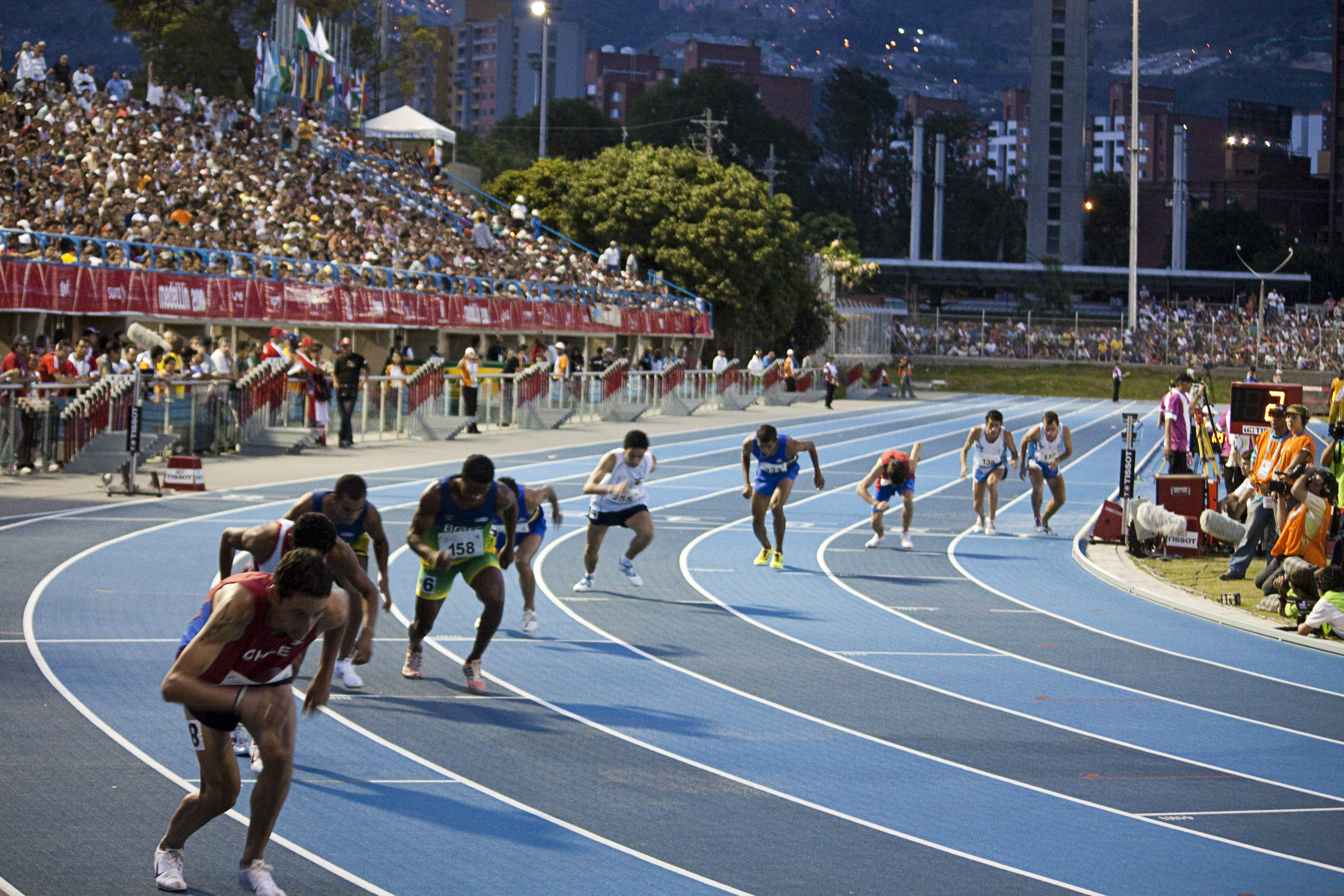 Partida 800m Masculino - IX Juegos Suramericanos Medellín 2010